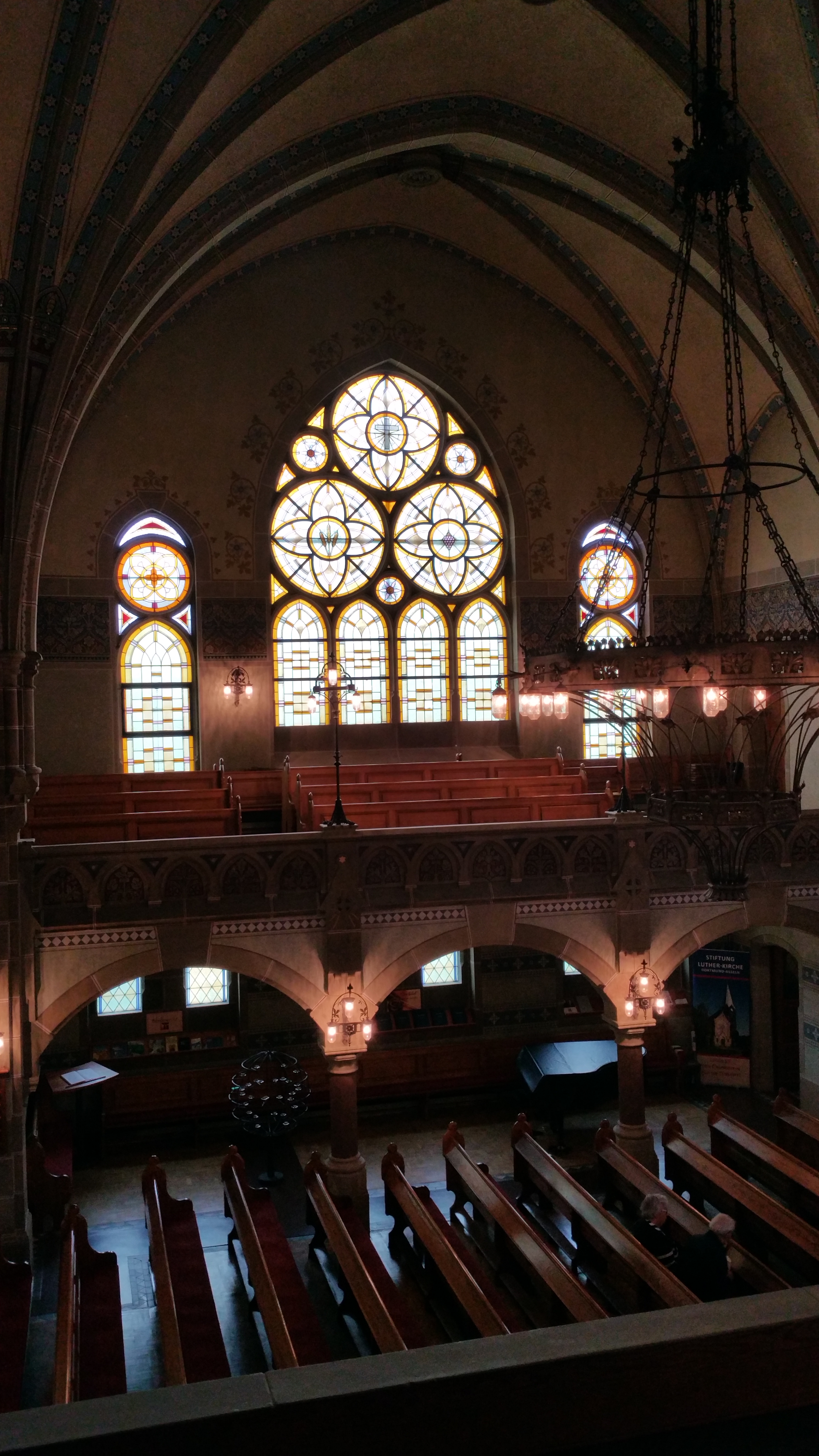 Dortmund Asseln ev Kirche, Ansicht der Nordempore mit Fenster